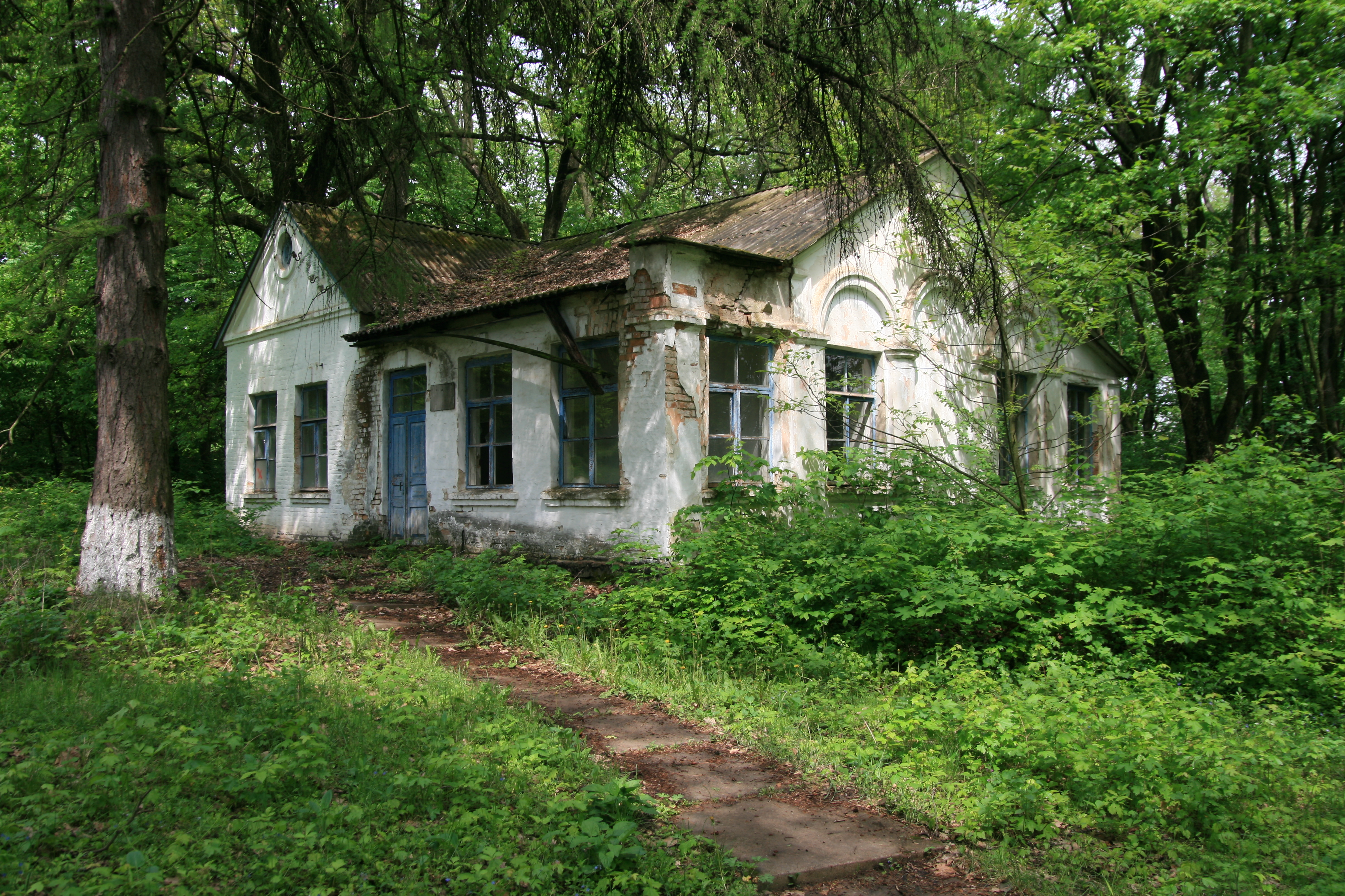 Парк-пам'ятка садово-паркового мистецтва (29,8 га), село П'ятигори